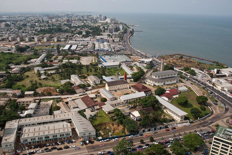 Libreville Front de Mere , Cathedral Sainte Marie.